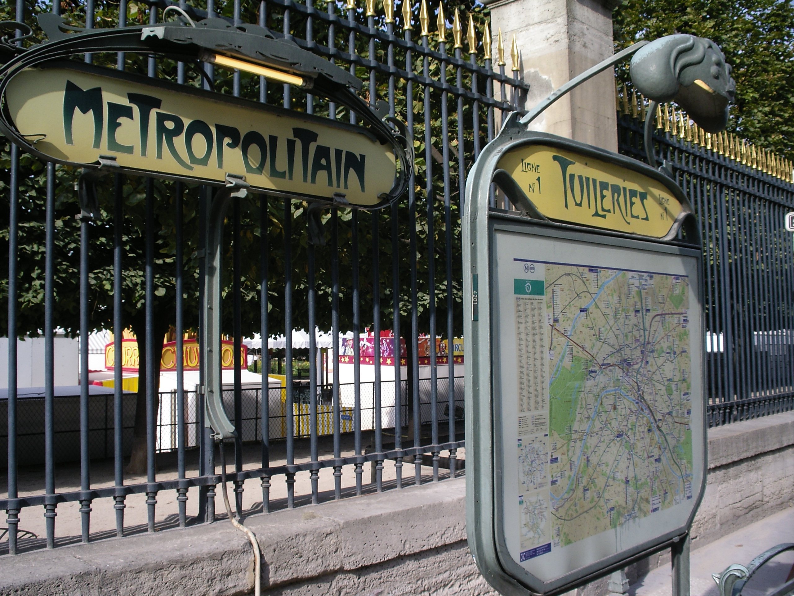 zelfgemaakte foto